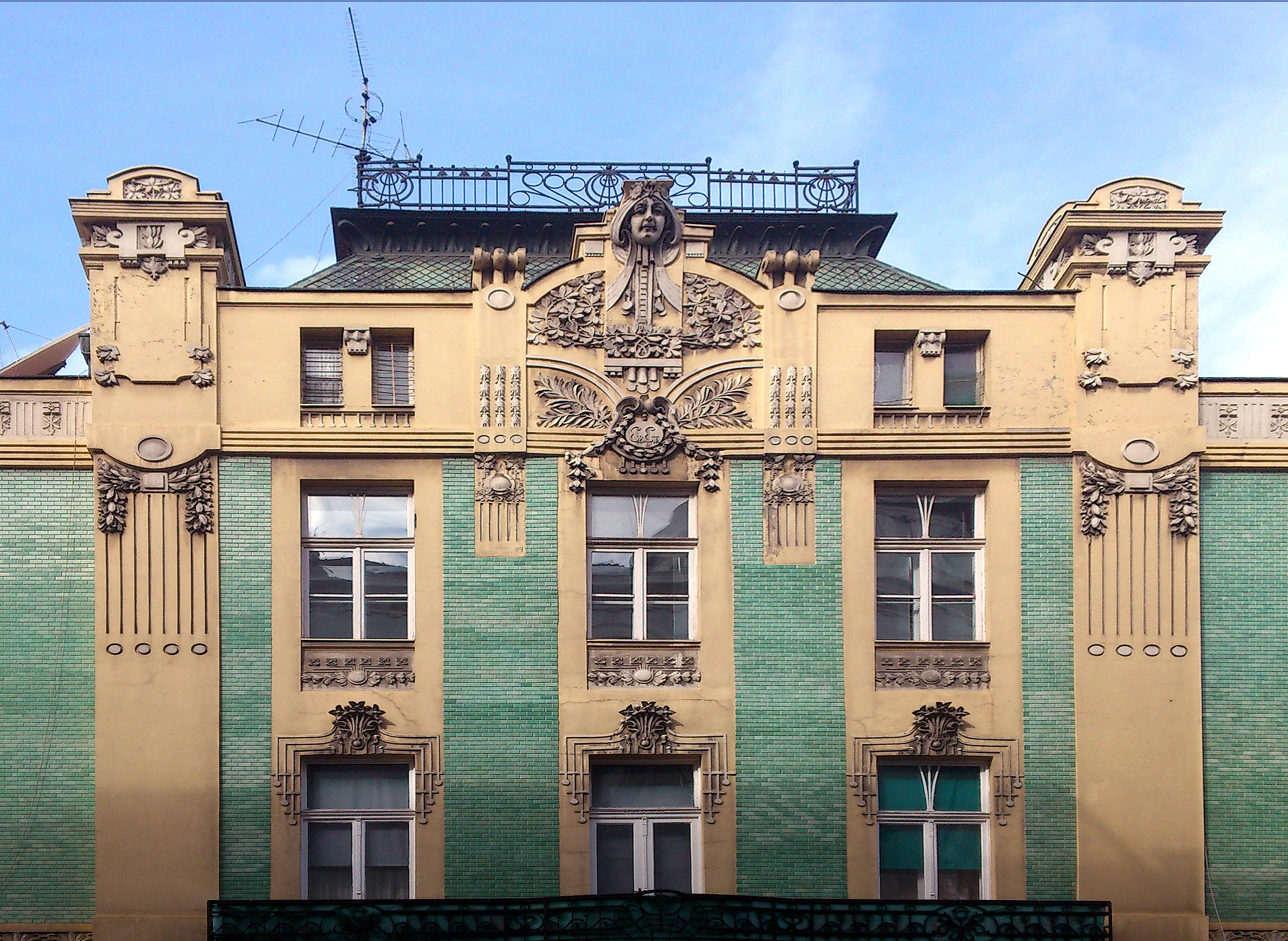 Beograd Kuća trgovca Stamenkovića Kralja Petra 41